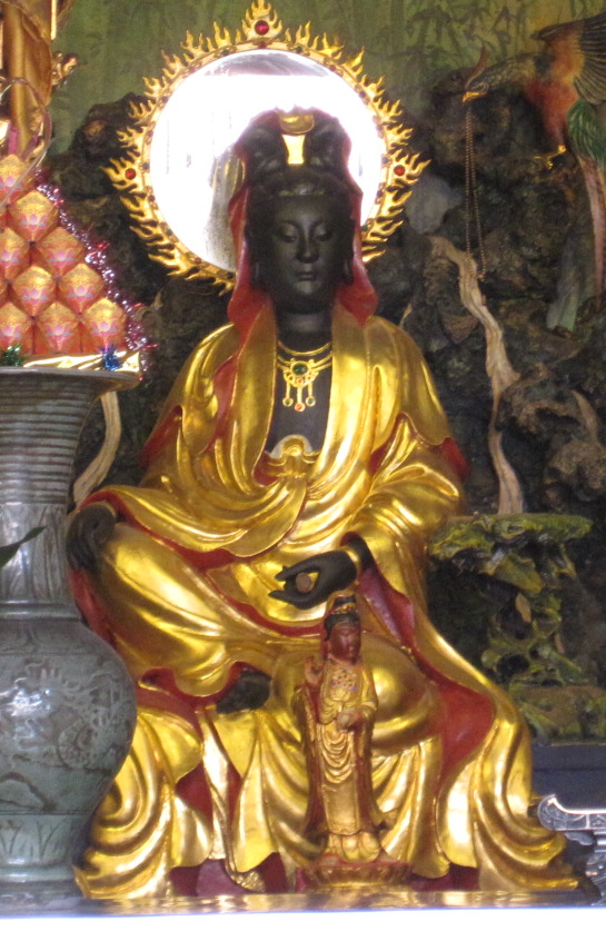 大天后宮觀音像